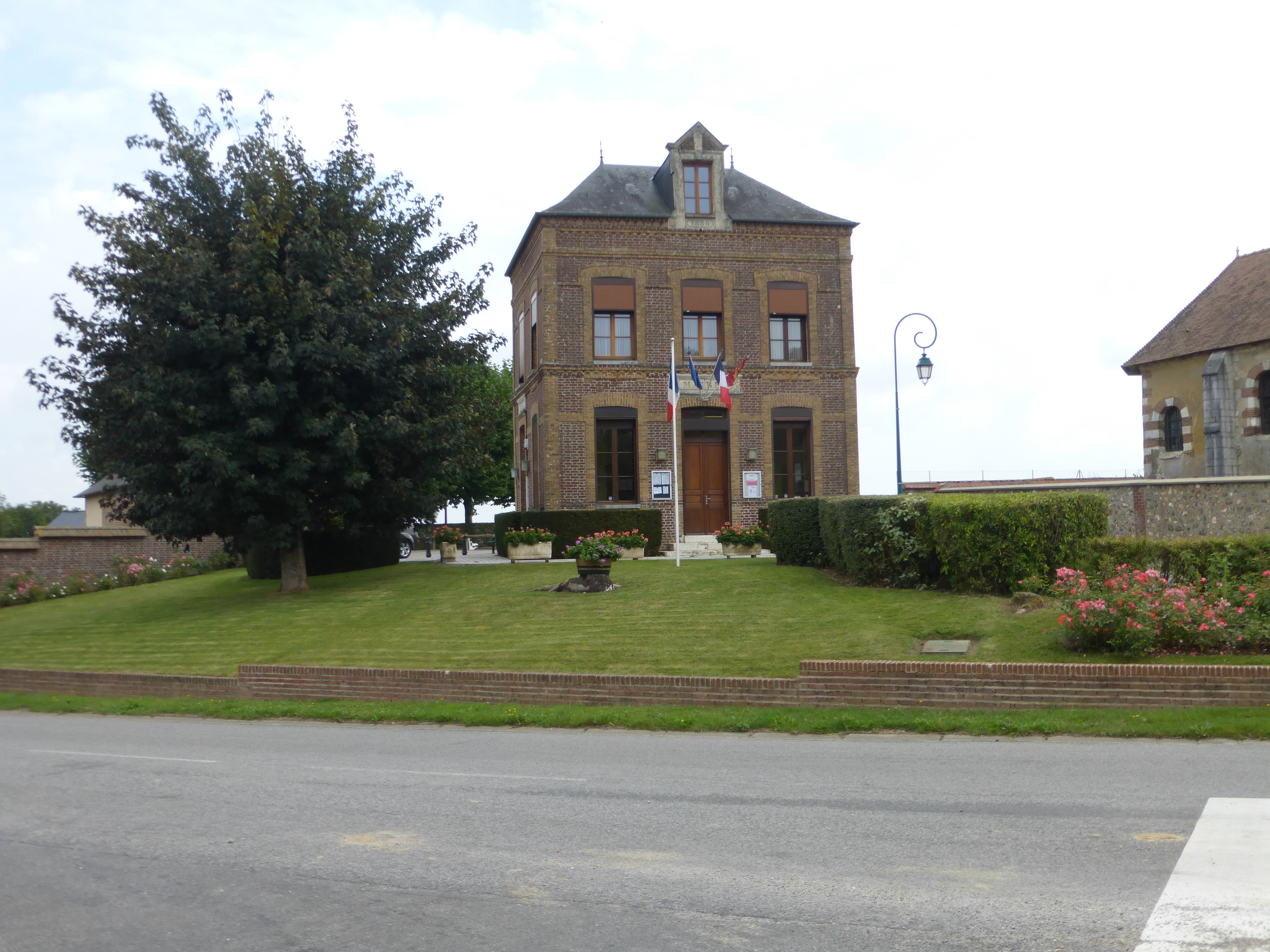 MANDEVILLE Mairie